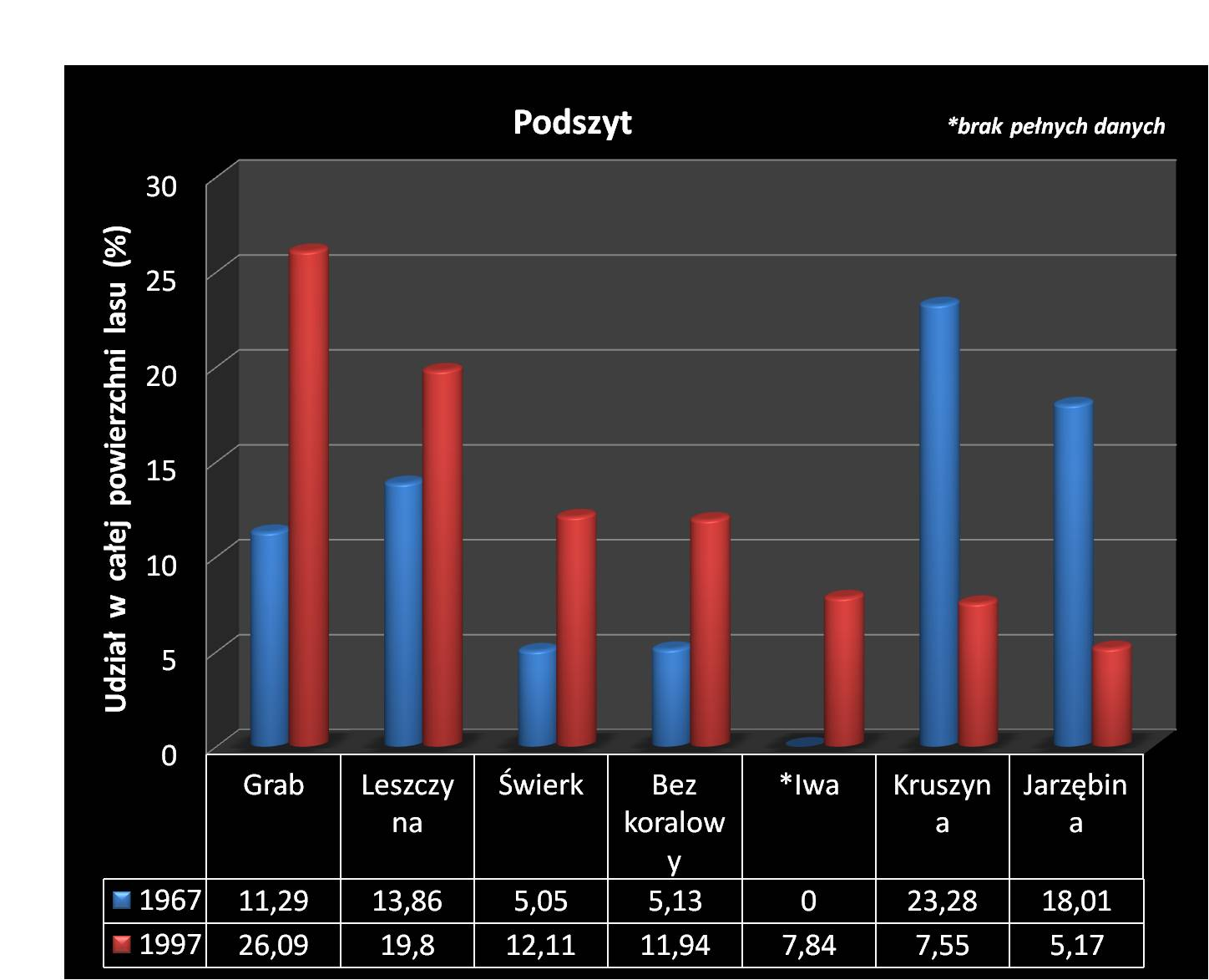 Autor: Adrian Grzegorz